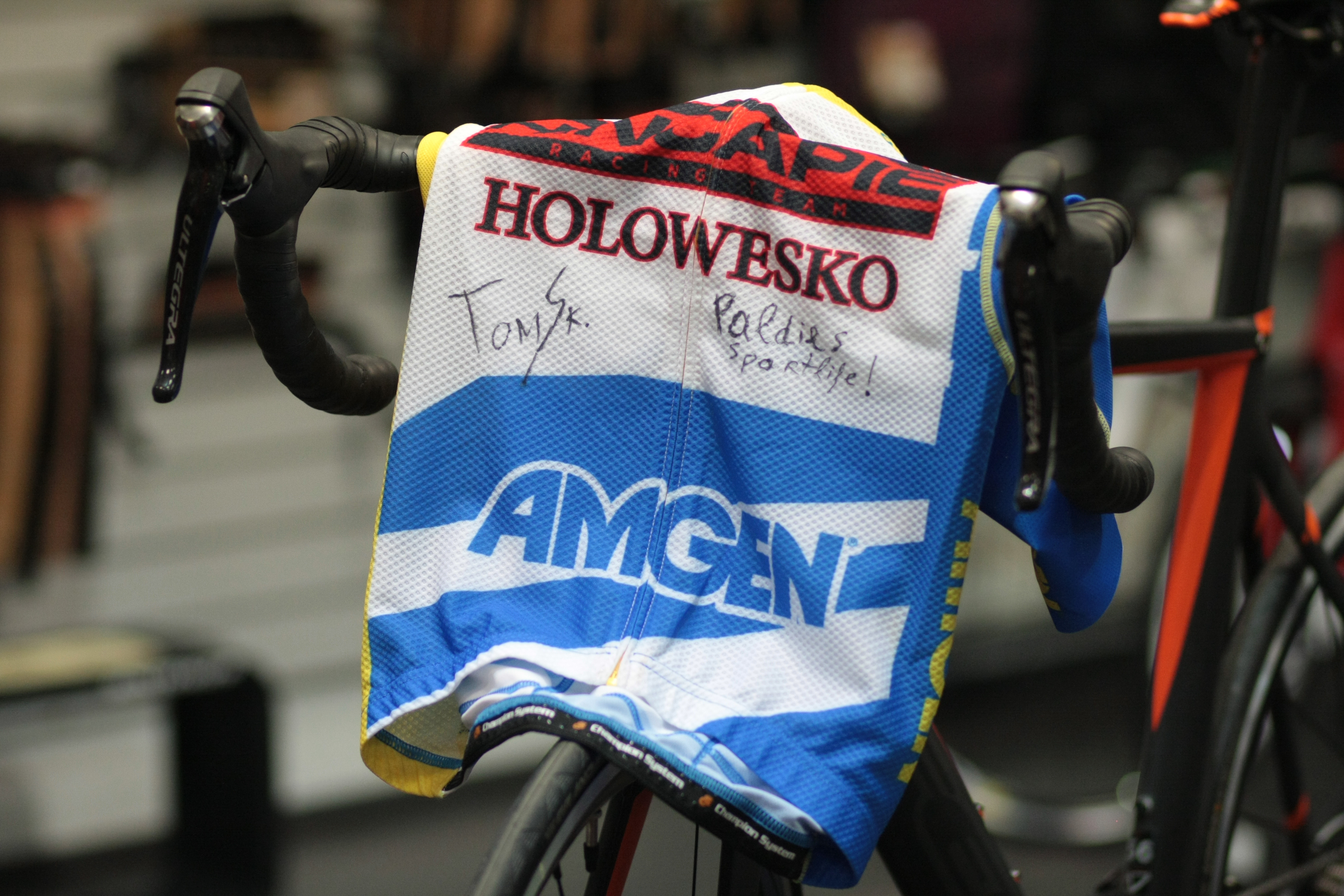 Tour of California leader jersey, Toms Skujiņš, 2015